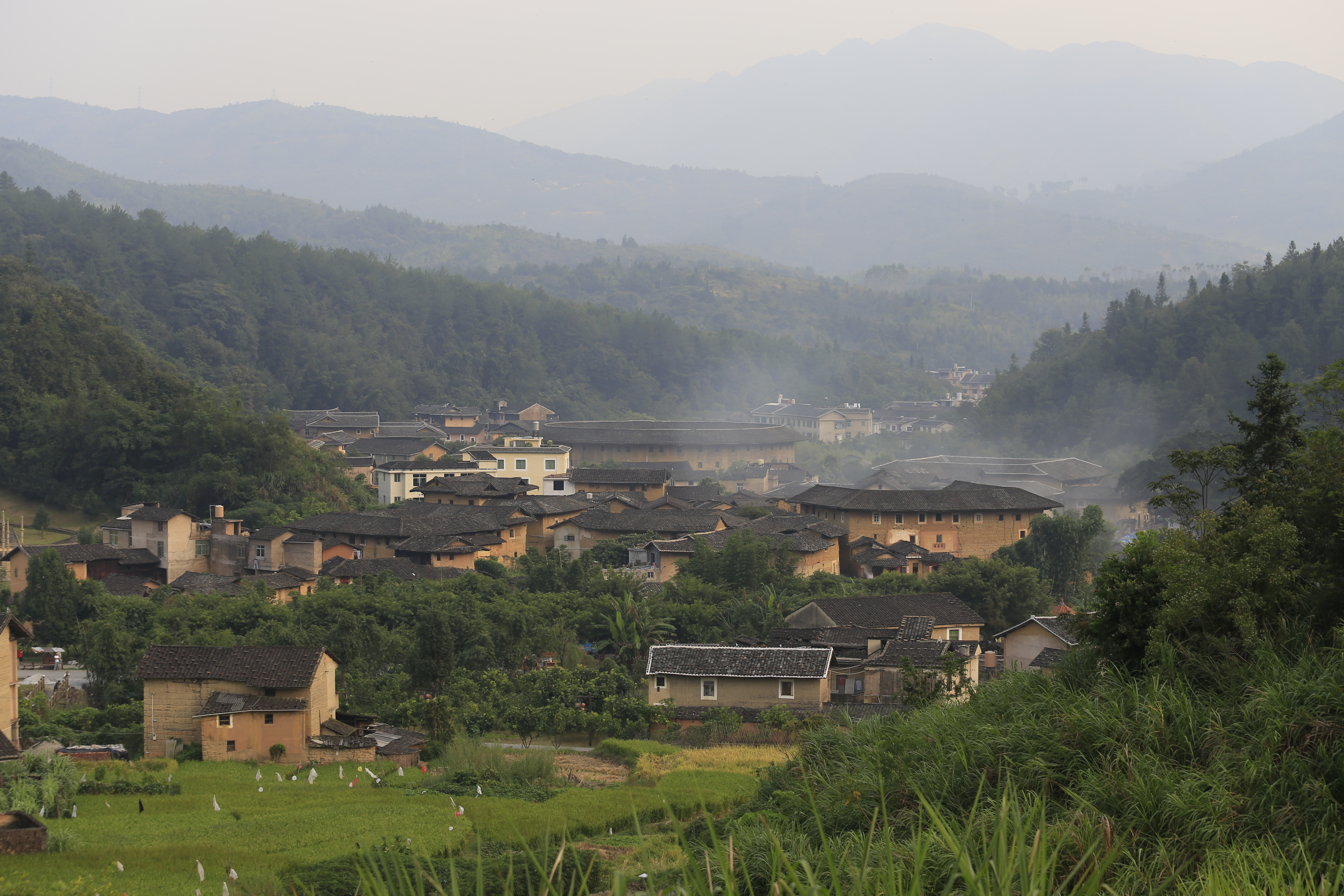 福建省永定县湖坑镇洪坑村—— 俯瞰洪坑，远处最大的圆楼为振成楼